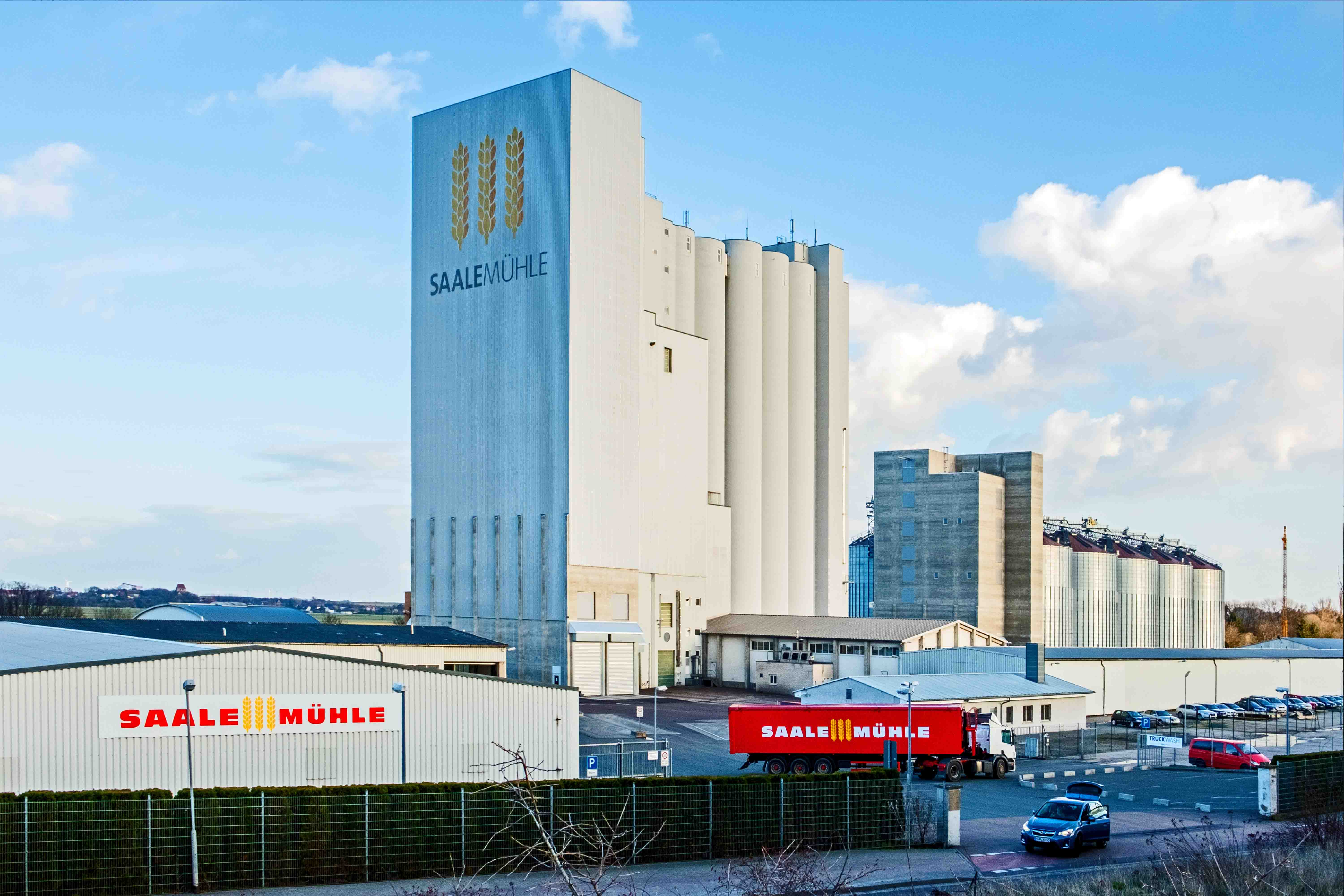 Saalemühle Alsleben (Saale) mit Haupteingang von der Straße aus gesehen